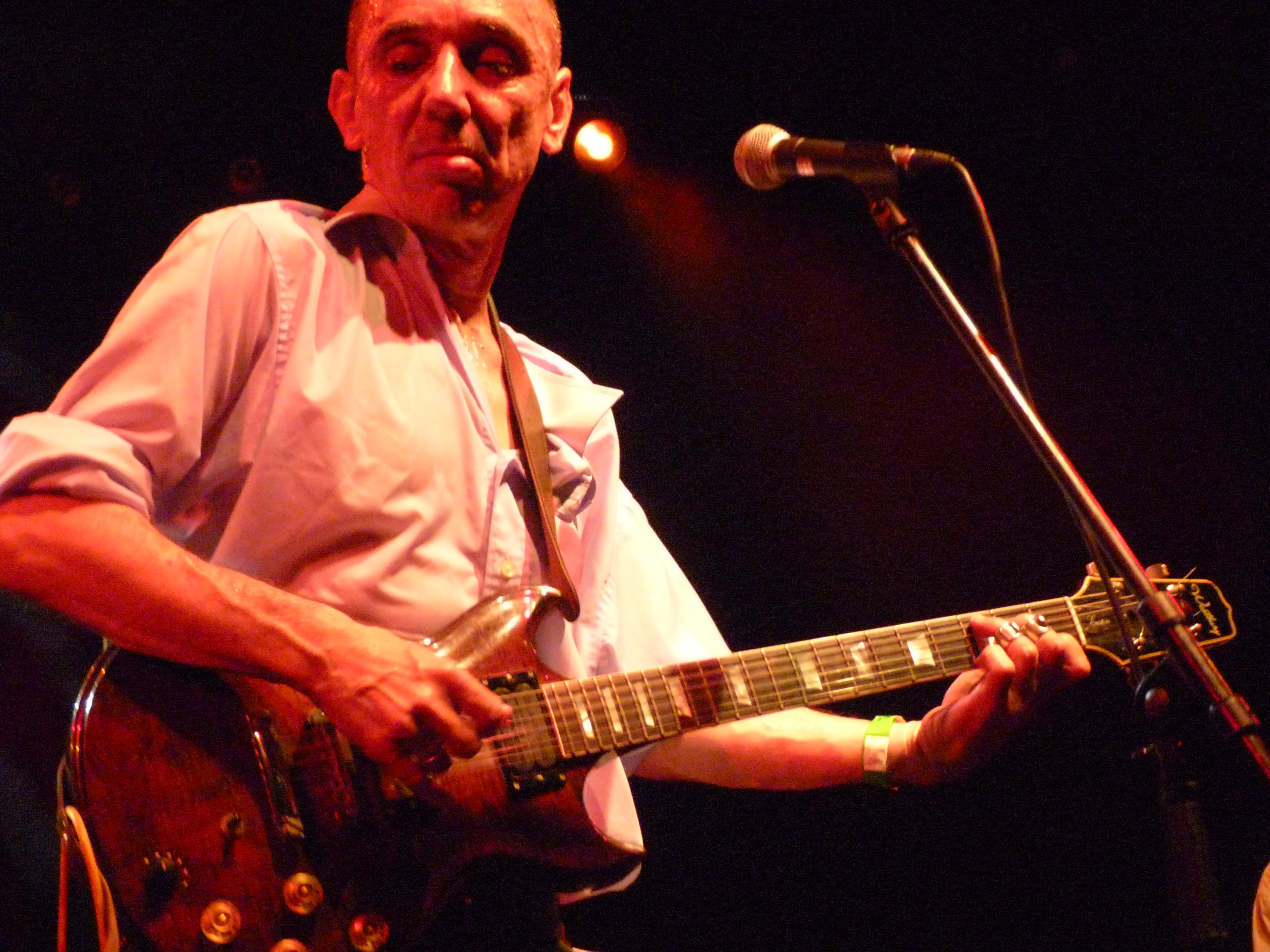 A felvétel 2013. Június 21 –én készült Budapesten, a Millenáris Teátrumban. Európa Kiadó. Menyhárt Jenő. ©© Published under Creative Commons in the Metapolisz DVD line. All of the photos and vids in the Metapolisz DVD line are under Creative Commons and can be used even for commercial – for profit – purposes. Recommended Citation Derzsi Elekes Andor: Metapolisz DVD line